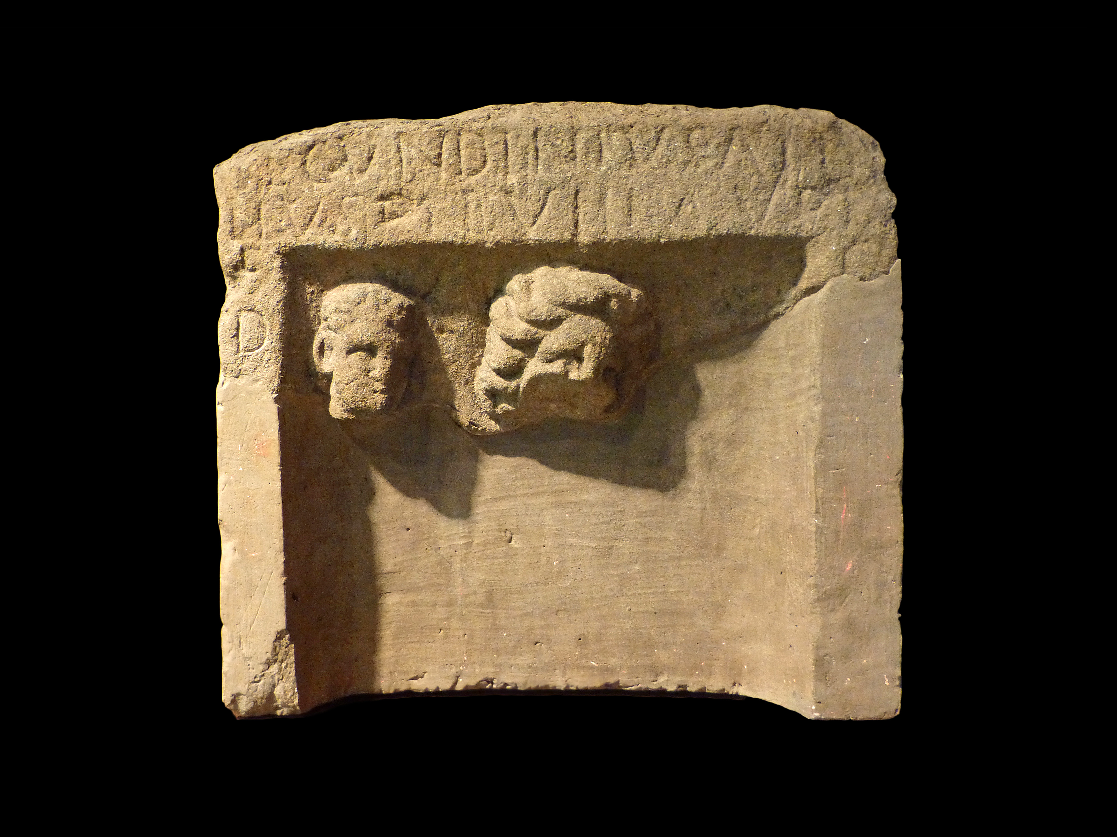 Musée historique de Haguenau (Bas-Rhin) : stèle funéraire trouvée à Schweighouse. Dédicace : Secundinius Atti / Ilus et Diuillia uot(o) / (a) e / de (em?) / N° R172.